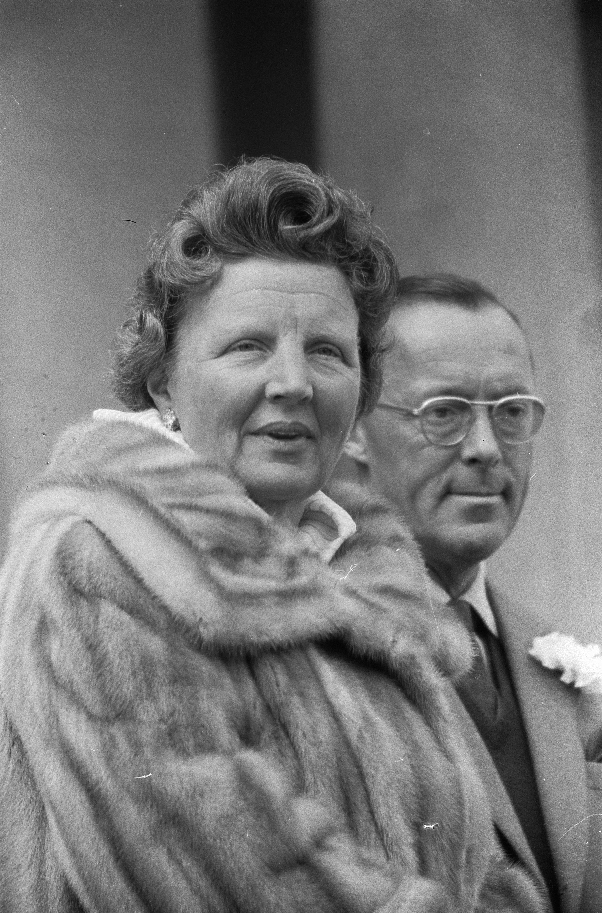 Collectie / Archief : Fotocollectie Anefo Reportage / Serie : [ onbekend ] Beschrijving : Bloemendefile voor koningin Juliana op Paleis Soestdijk , koppen van Prinses Beatrix , Prinses Irene , Hare Majesteit en Prins Bernhard / Datum : 30 april 1960 Trefwoorden : Bloemendefiles, koningin Persoonsnaam : Beatrix, prinses, Bernhard, prins, Irene, prinses, Juliana (koningin Nederland) Fotograaf : Pot, Harry / Anefo Auteursrechthebbende : Nationaal Archief Materiaalsoort : Negatief (zwart/wit) Nummer archiefinventaris : bekijk toegang 2.24.01.05 Bestanddeelnummer : 911-2041